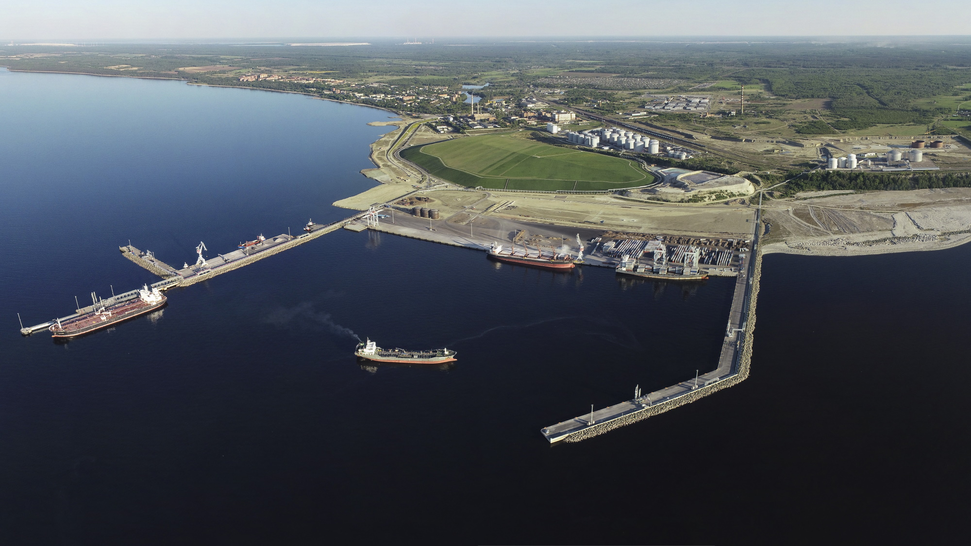 Sillamäe sadam